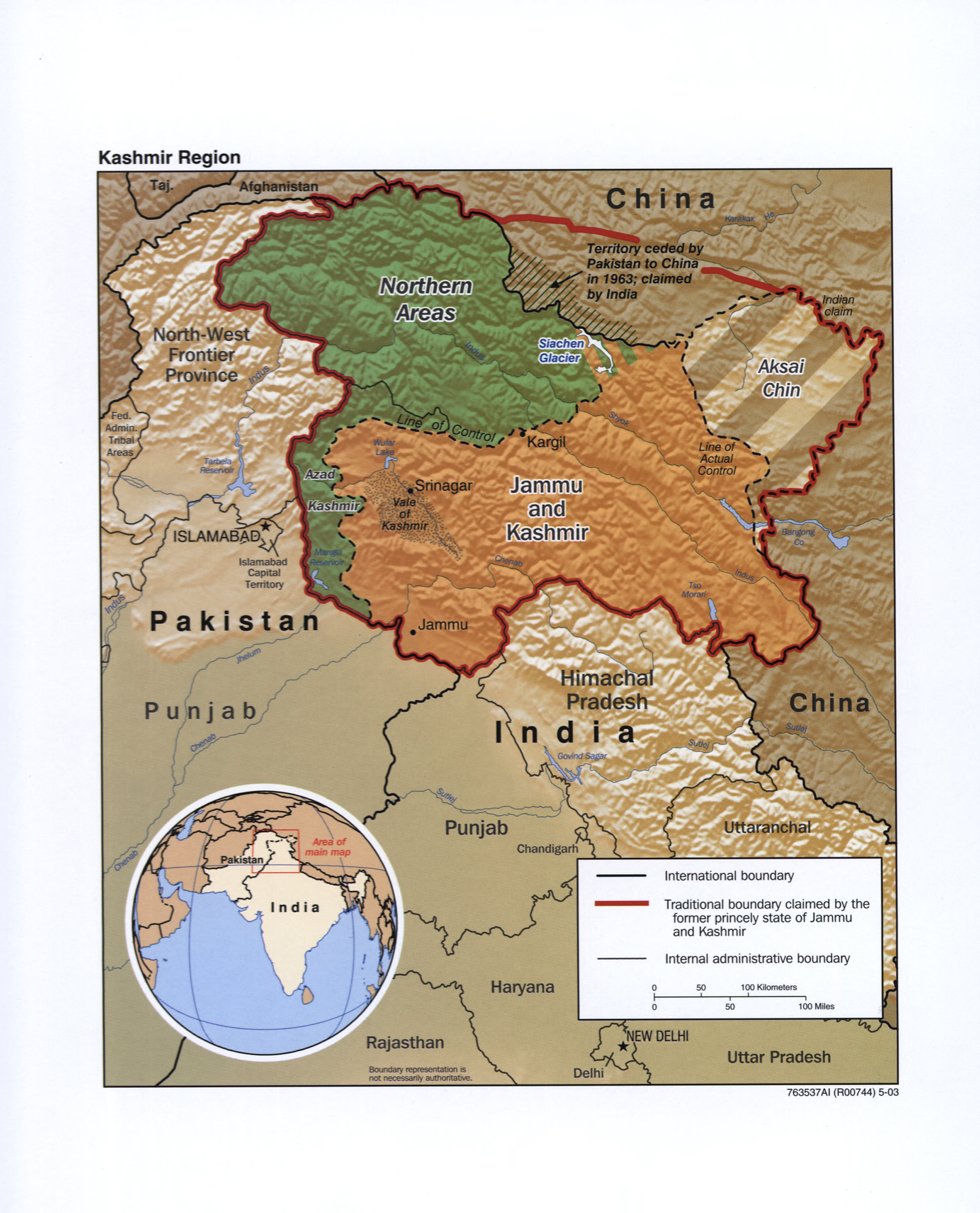 2003 Kashmir Region